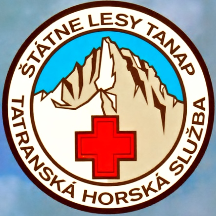 Odznak Tatranskej horskej služby